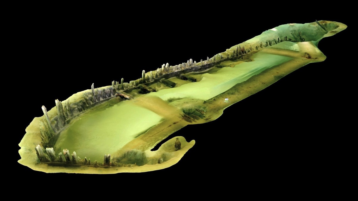 Wrak 'Portowiec' - obraz przygotowany w ramach prac nad Wirtualnym Skansenem Wraków Zatoki Gdańskiej. Narodowe Muzeum Morskie w Gdańsku